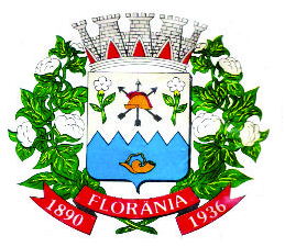 Brasão de Florânia, Rio Grande do Norte, Brasil